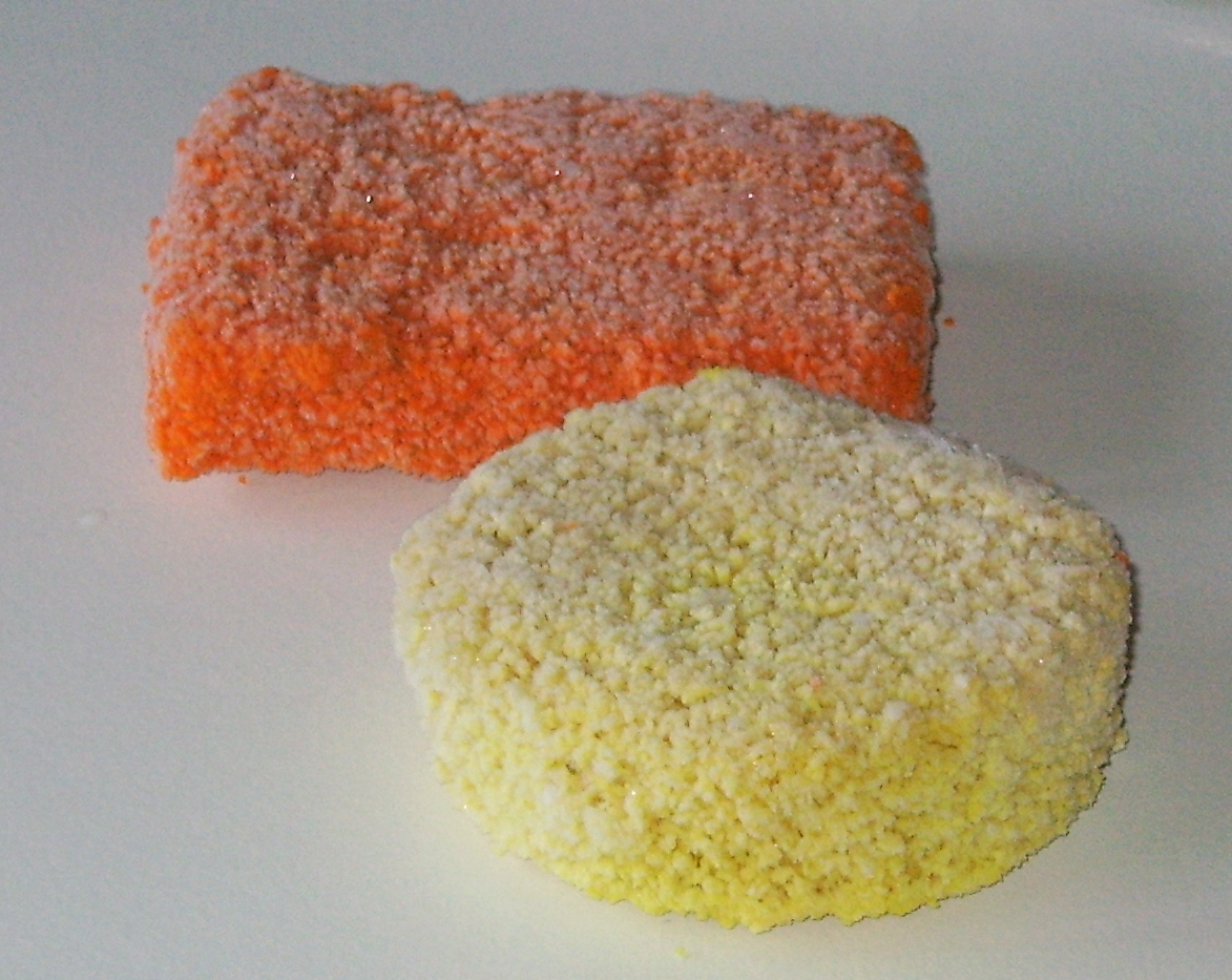 Nasischijf (slice), Bamihap, frozen, Dutch snack, Nasi Goreng